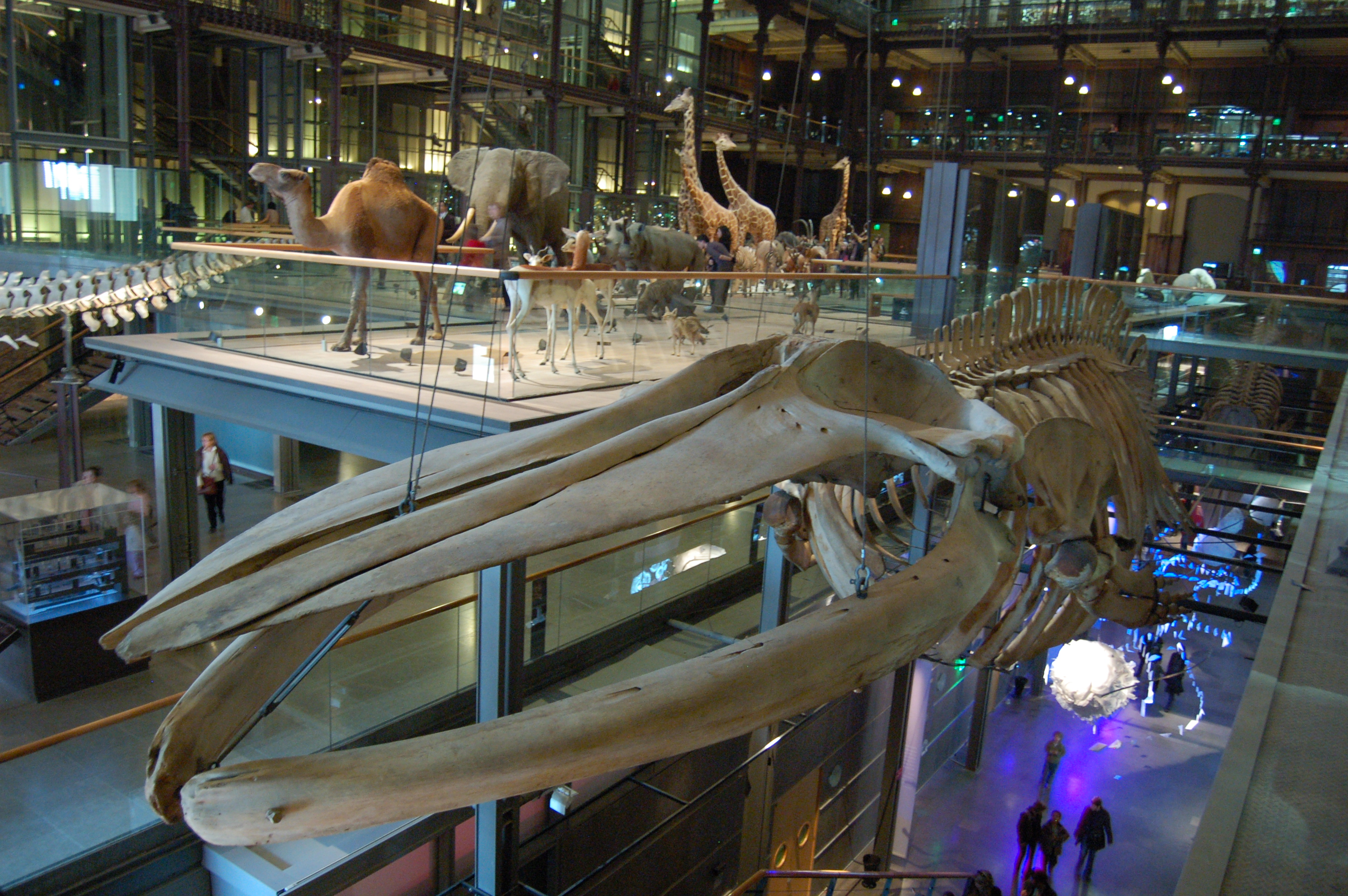 Grande galerie de l'évolution du Muséum national d'histoire naturelle